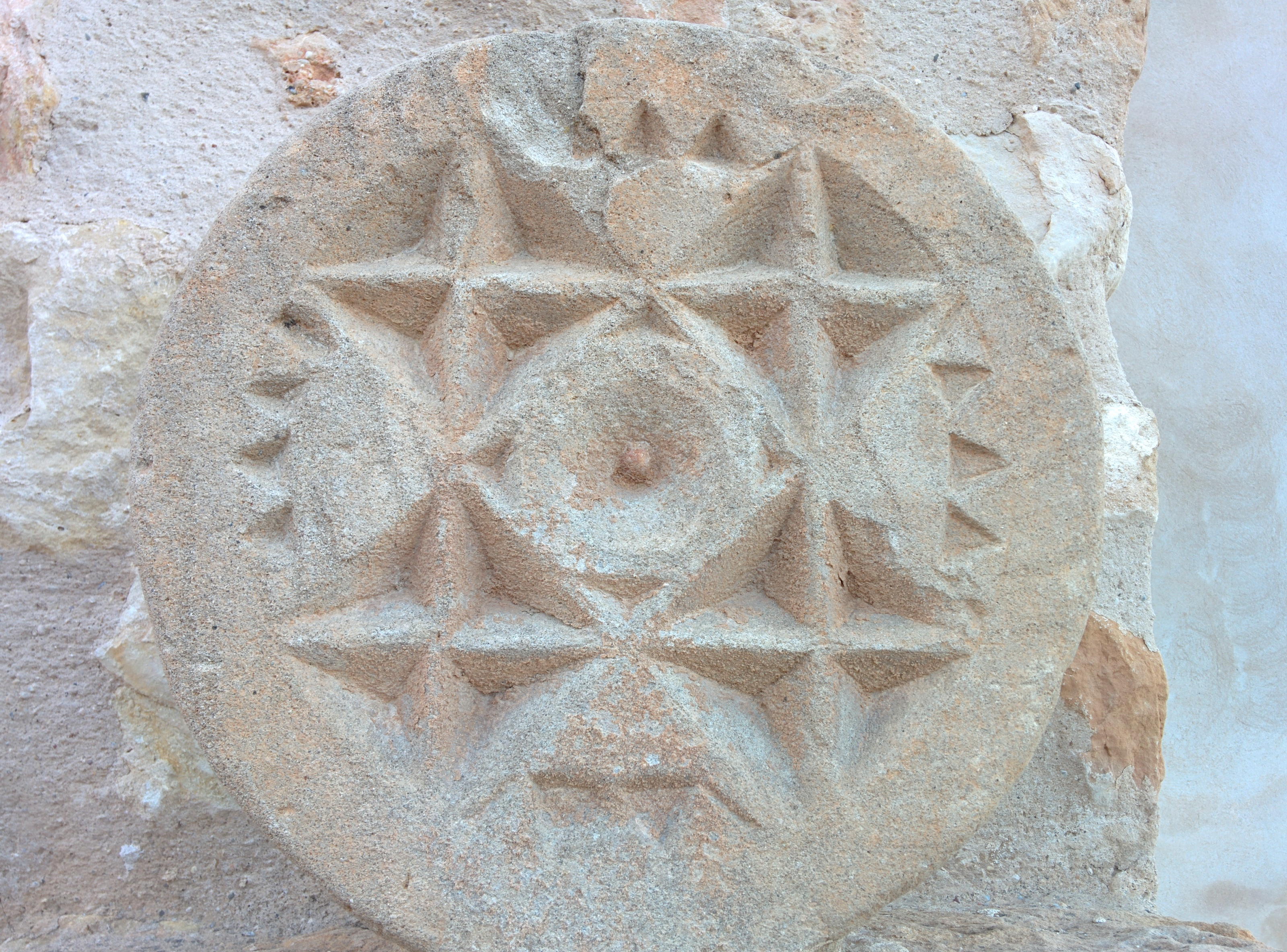 Foto de una cruz de la iglesia de Cólliga